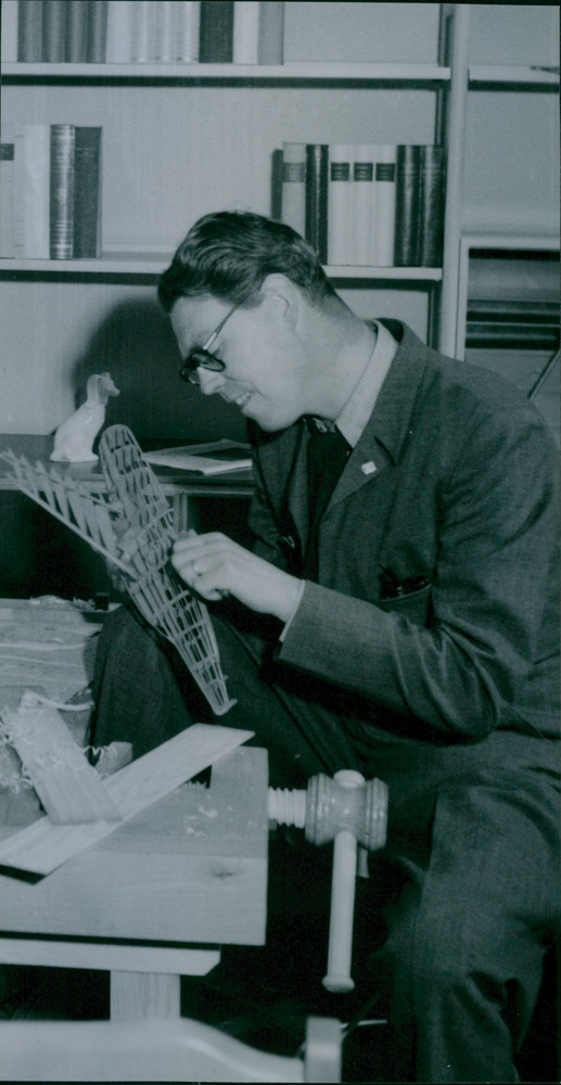 Bildtext från 1949: "Utställningens ledare arkitekt Thorsten Roos i en ultramodern barnkammare."